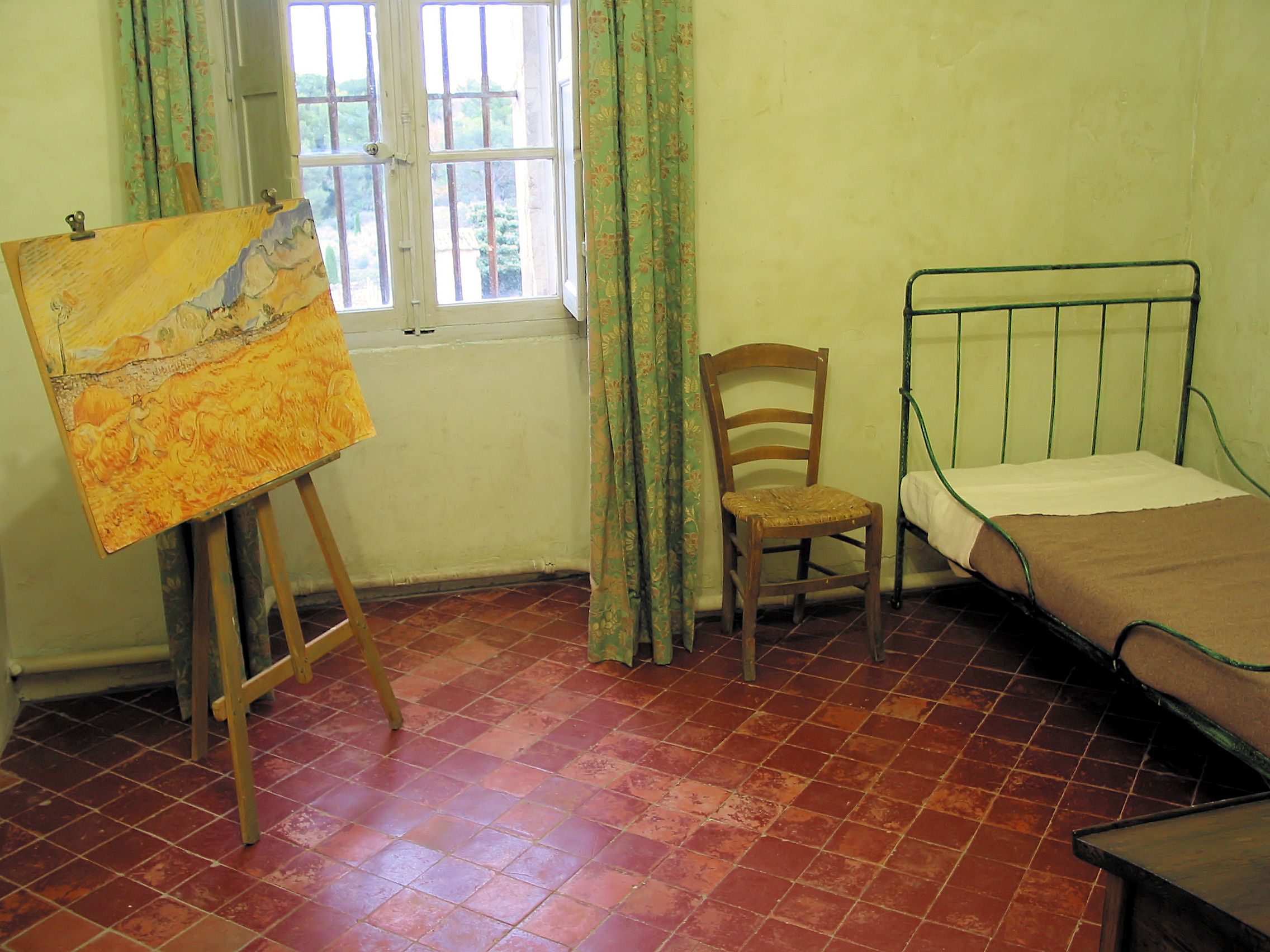 Chambre Vincent van Gogh monastère Saint Paul de Mausole Saint Rémy de Provence